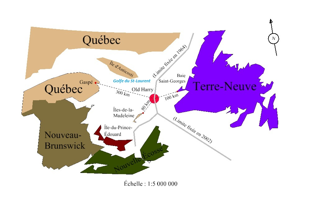 Carte Old Harry